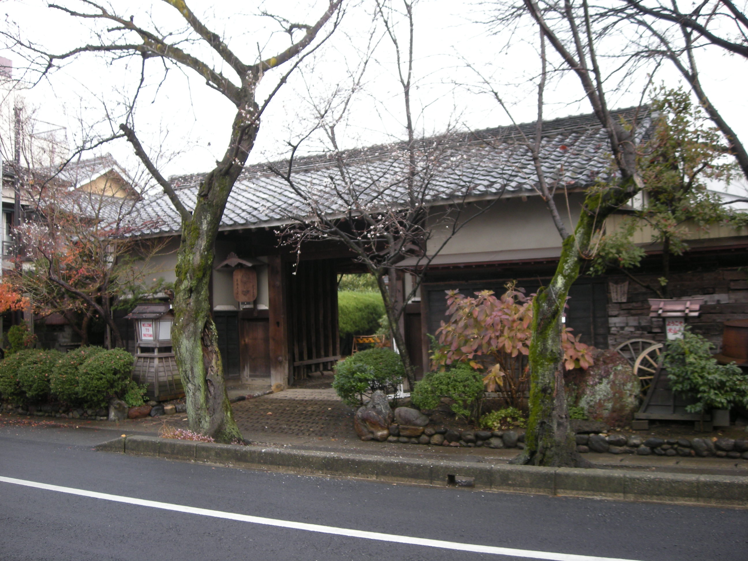 Annex Karakuri Exhibition Room（からくり展示館）